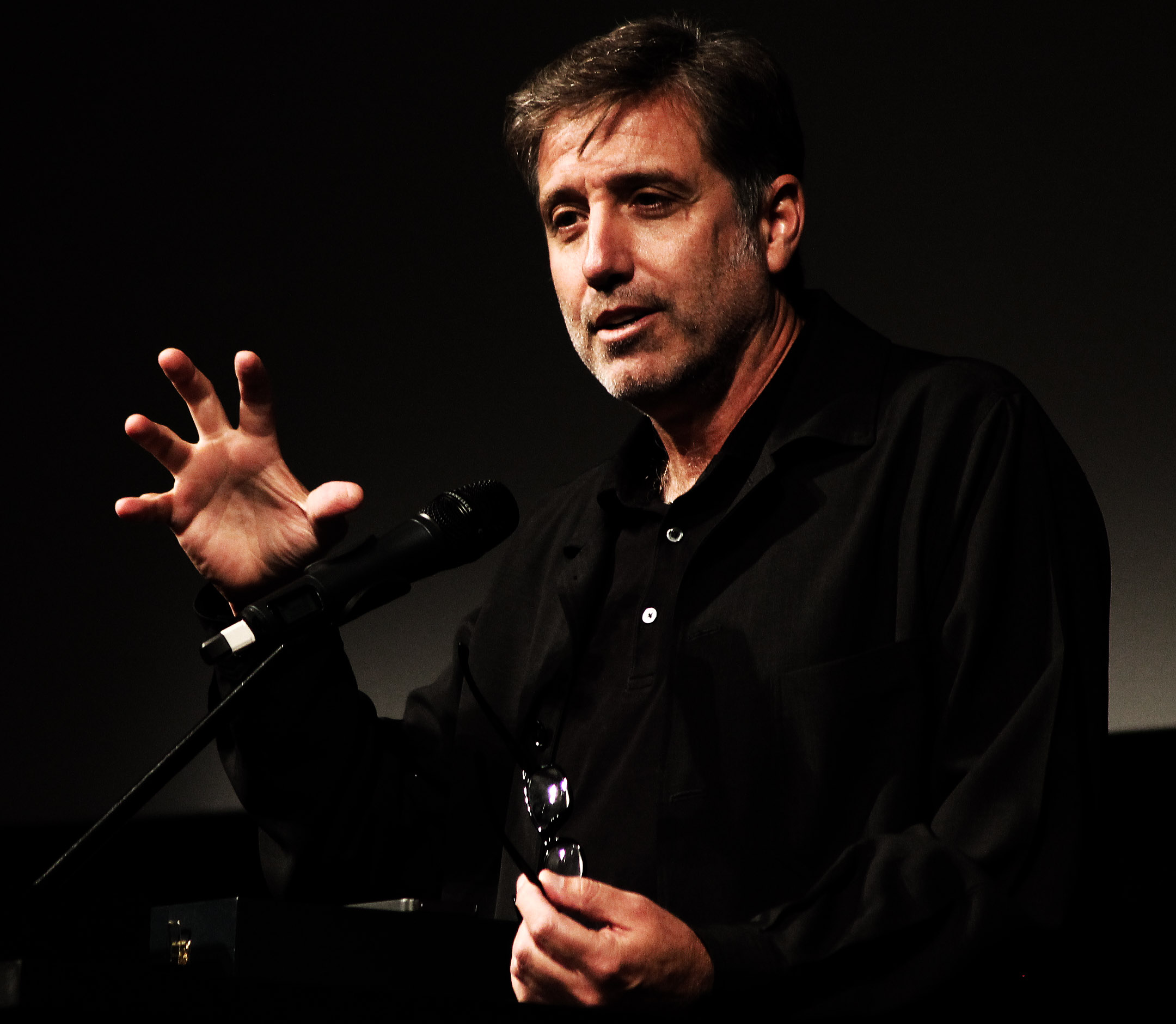 Emilio Aragón en la entrega de la Espiga de Honor a Imanol Arias